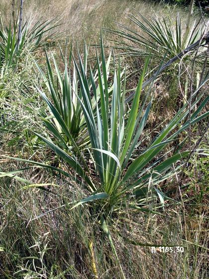 Yucca arkansana